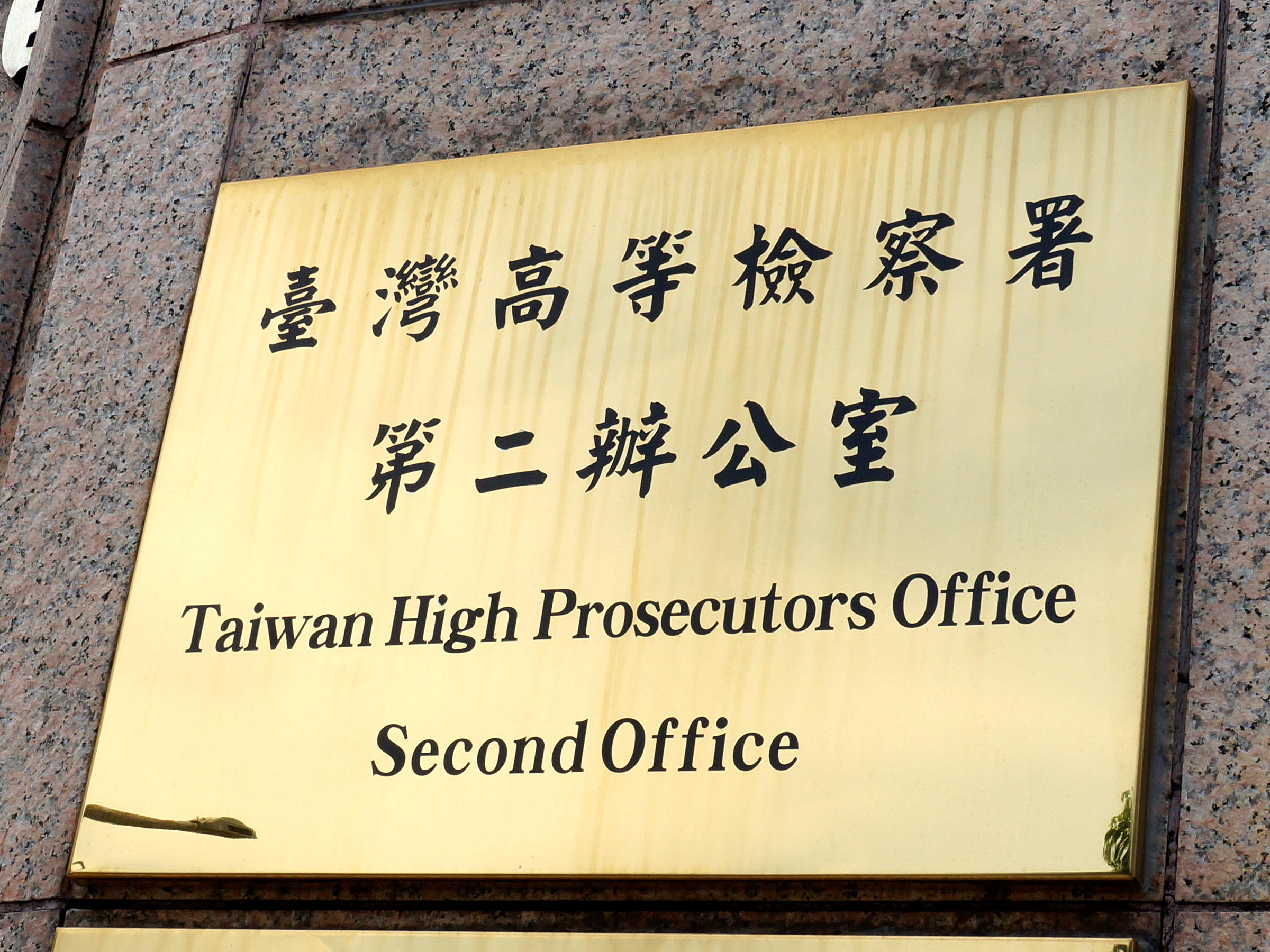 臺灣高等檢察署第二辦公室銘板，位於國家通訊傳播委員會延平南路辦公室大門右側。